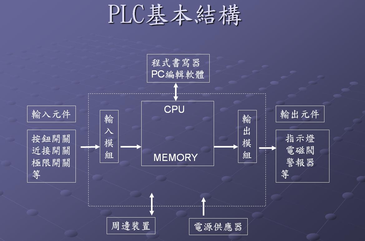 PLC的系統架構